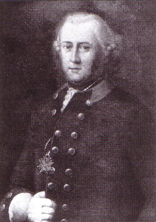 Porträt des Generals Heinrich Wilhelm von Anhalt